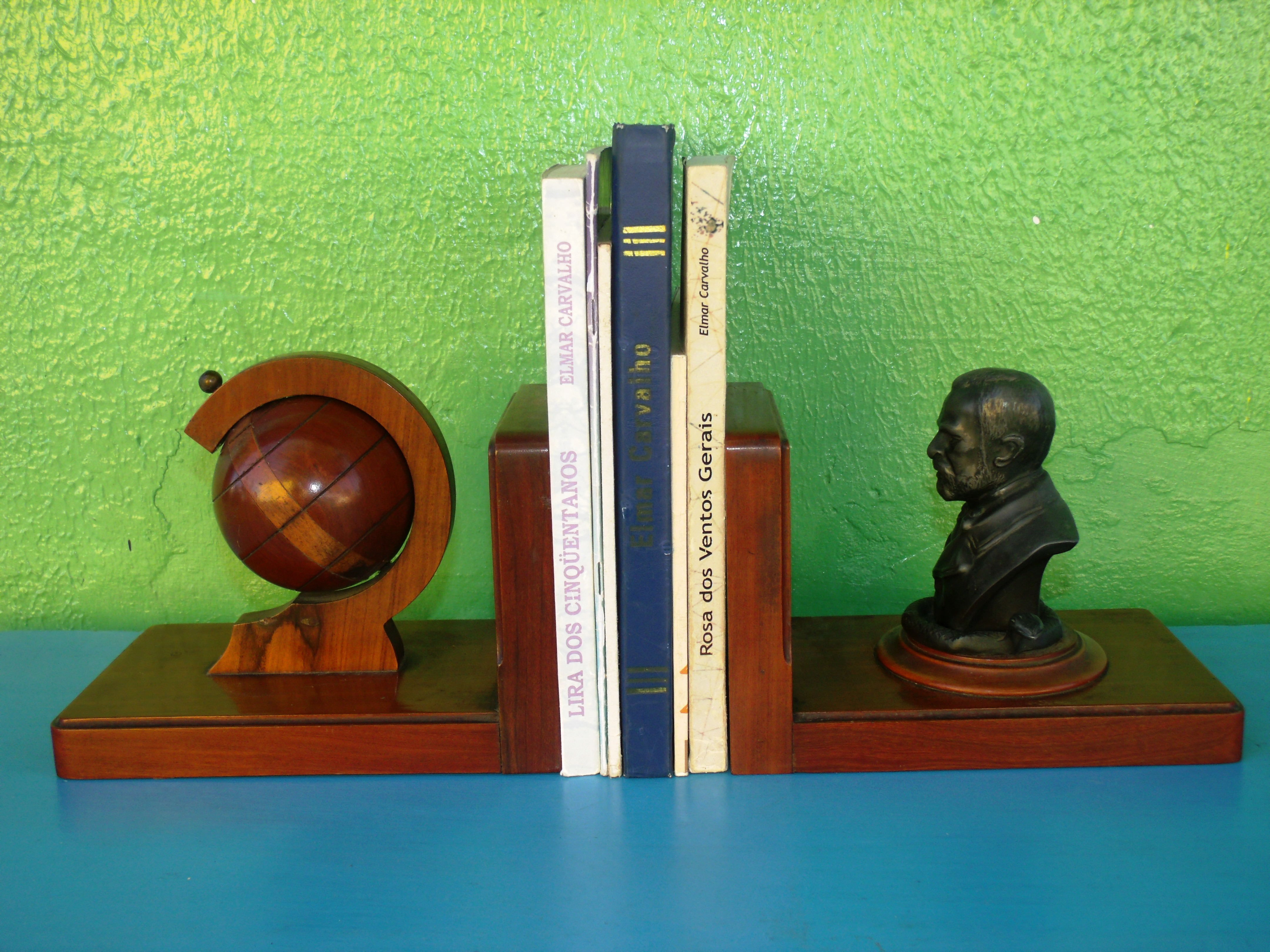 Exposição de literatura piauiense sobre Elmar Carvalho, membro da Academia Piauiense de Letras.